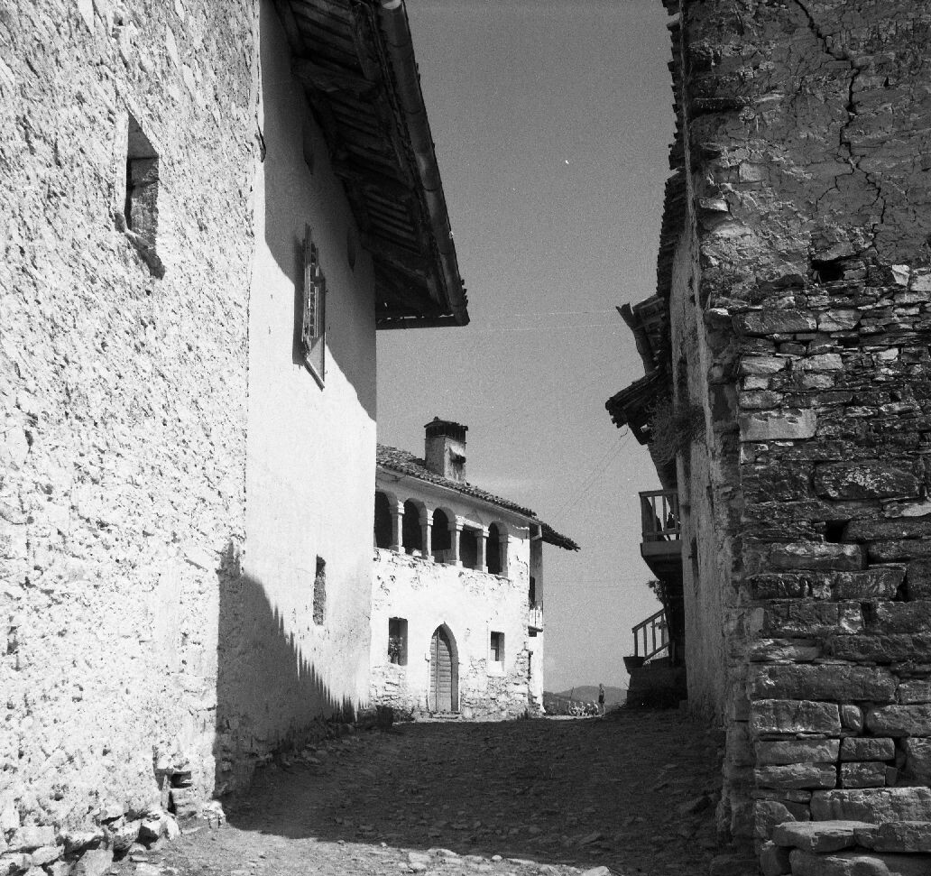 Ulica v Vedrijanu.